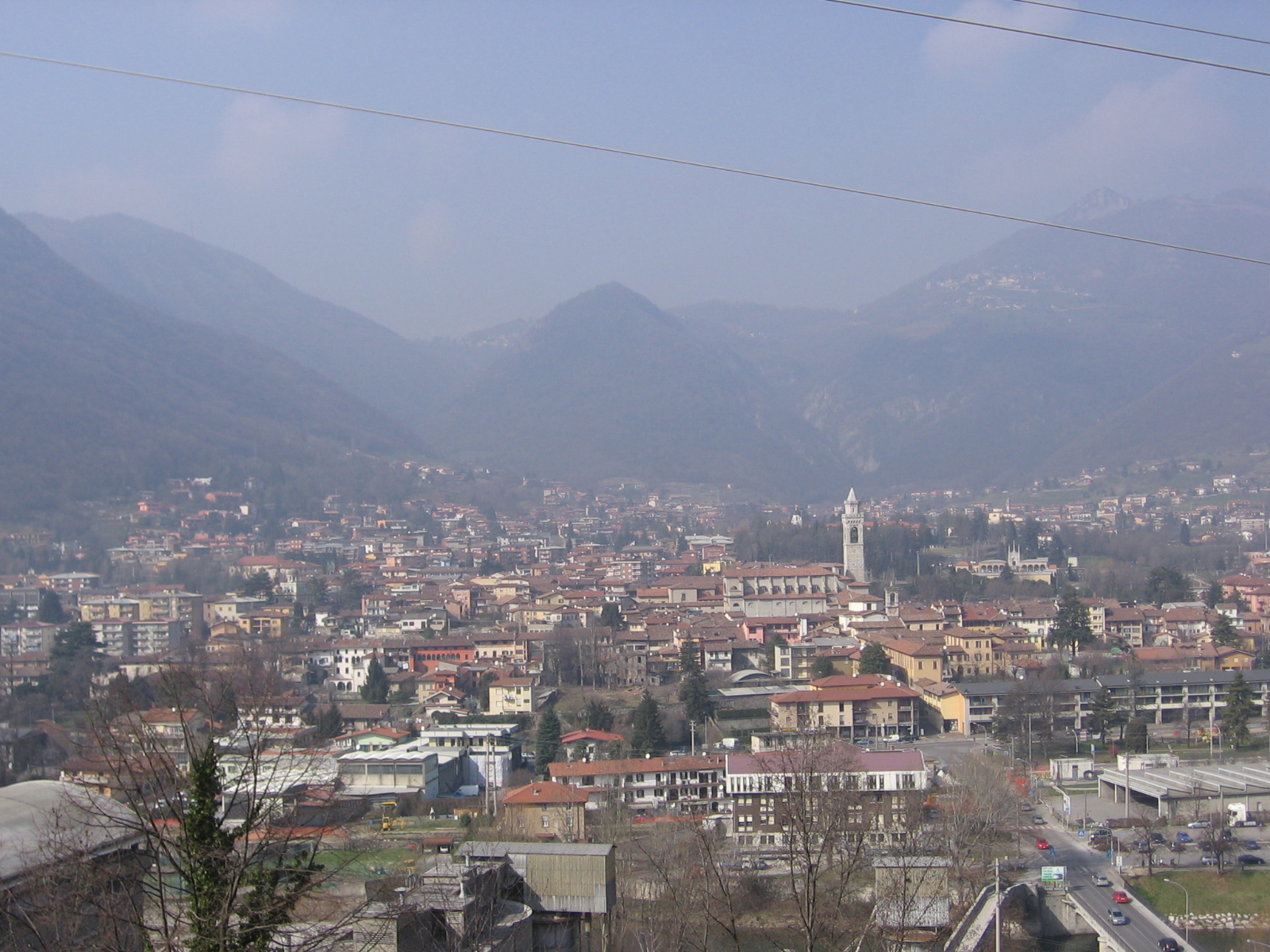 Albino, Bergamo, Italy